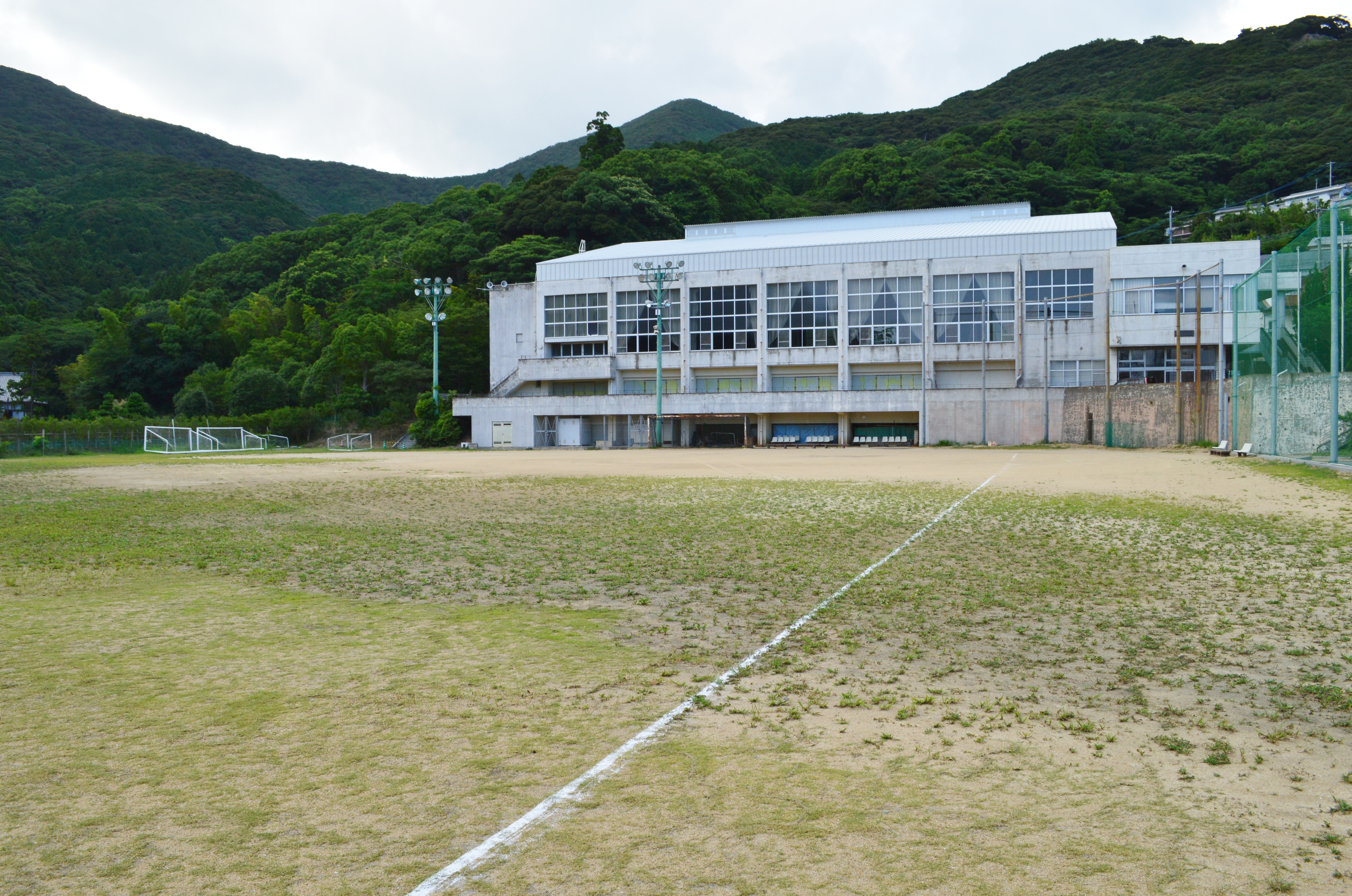 対馬国分寺跡推定地